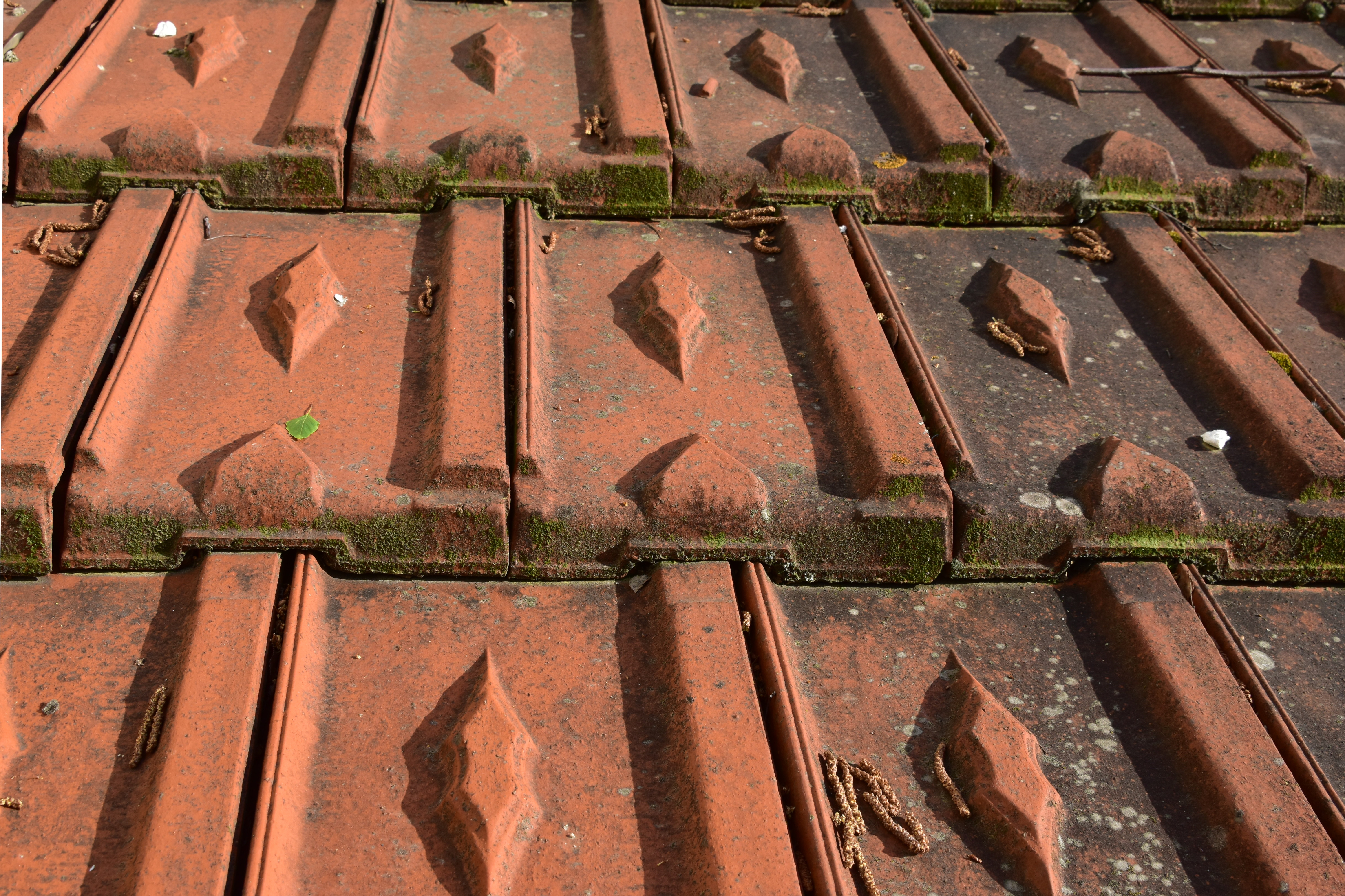 Tuiles losangées photographiées sur un toit en France.